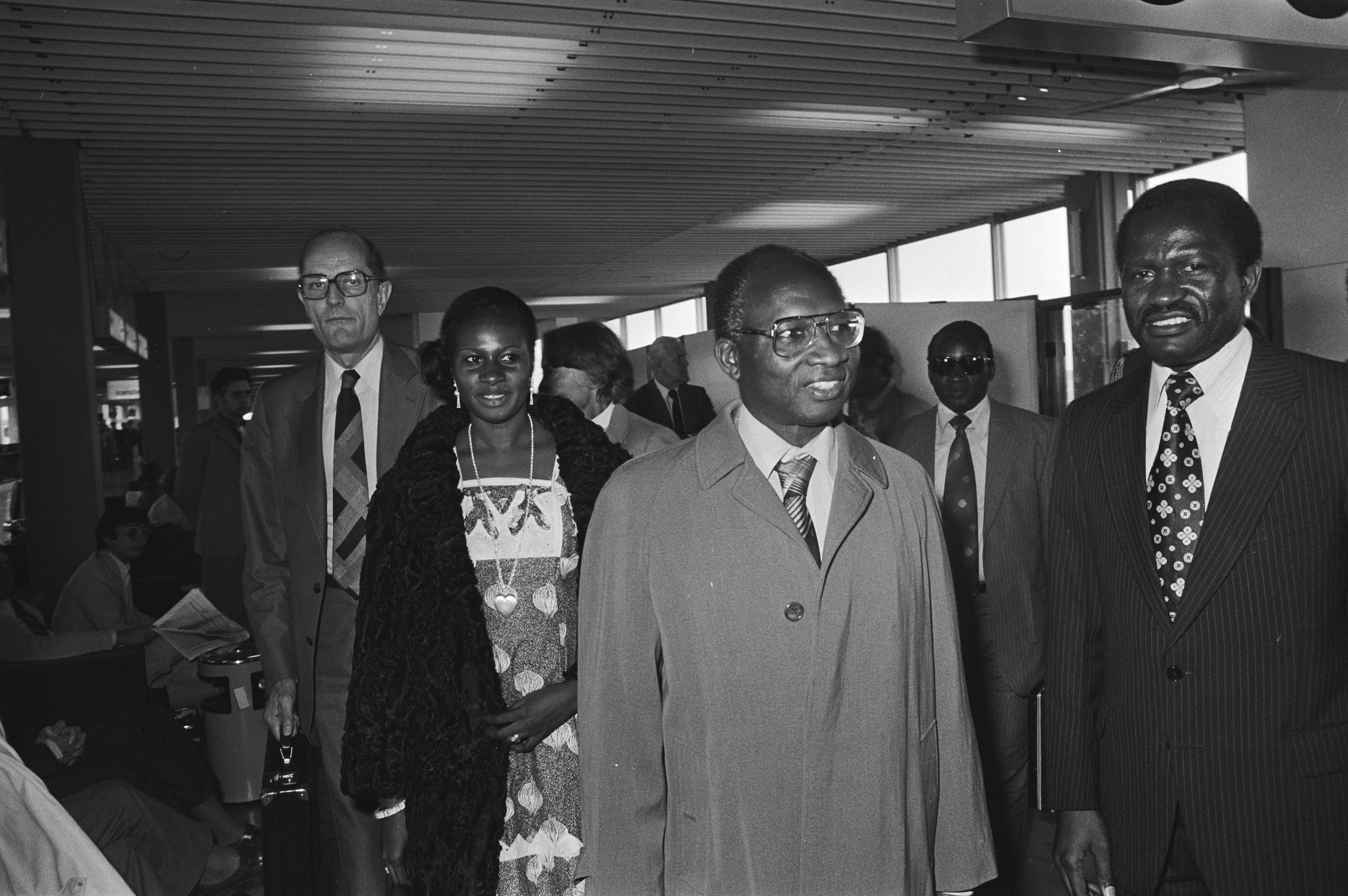 Collectie / Archief : Fotocollectie Anefo Reportage / Serie : Aankomst op Schiphol van president Dawda Jawara van Gambia Beschrijving : presidenten, aankomst en vertrek, Jawara, Dawda Datum : 13 september 1979 Locatie : Noord-Holland, Schiphol Trefwoorden : aankomst en vertrek, presidenten Persoonsnaam : Jawara, Dawda Fotograaf : Pereira, Fernando / Anefo Auteursrechthebbende : Nationaal Archief Materiaalsoort : Negatief (zwart/wit) Nummer archiefinventaris : bekijk toegang 2.24.01.05 Bestanddeelnummer : 930-4403